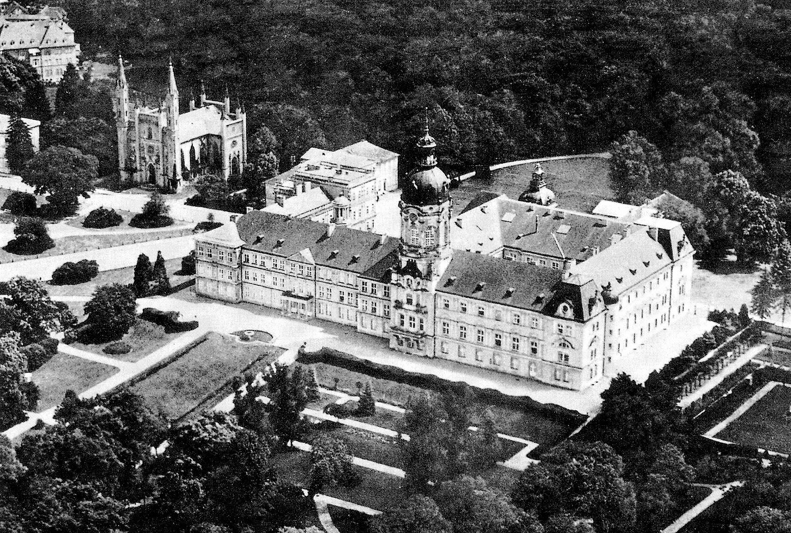 Schloss Neustrelitz Luftbild Schlosskirche um 1920